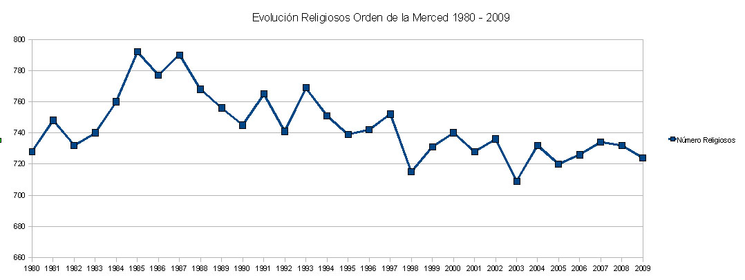 Los datos están tomados de las estadísticas de las Actas de los Capítulos Generales recogidas en Boletín de la Orden de la Meced, año 58 (1986), p. 167; año 64 (1992), p. 133; año 70 (1998), p. 155; año 76 (2004), p. 154; año 82 (2010), p. 331; y en las estadísticas anuales recogidas en la publicación citada, año 78/1 (2006), p. 130; año 79/1 (2007), p. 161; año 79/2 (2007), p. 150; y año 81/1 (2009), p. 181.